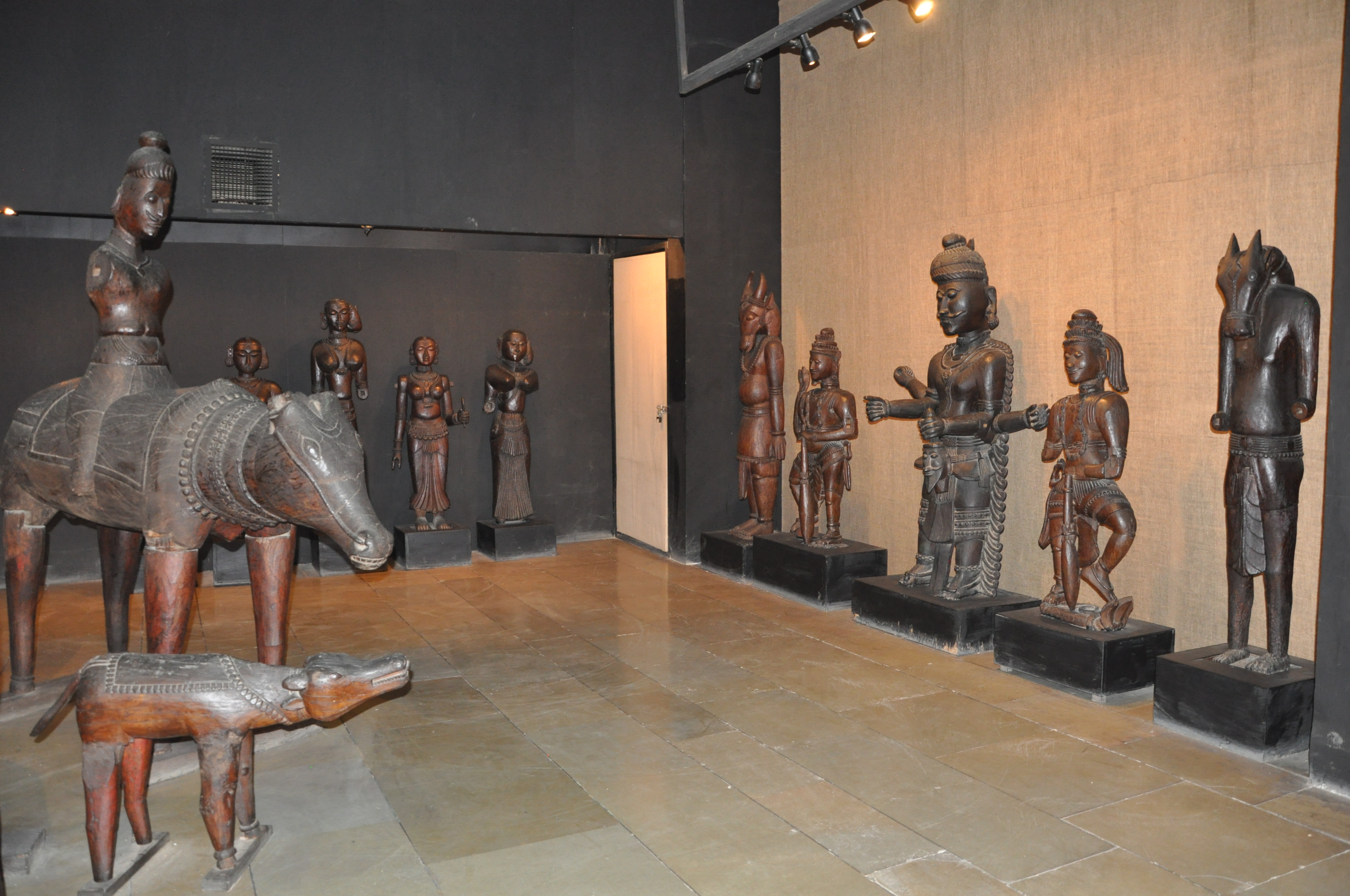 Bhuta Gallery long view